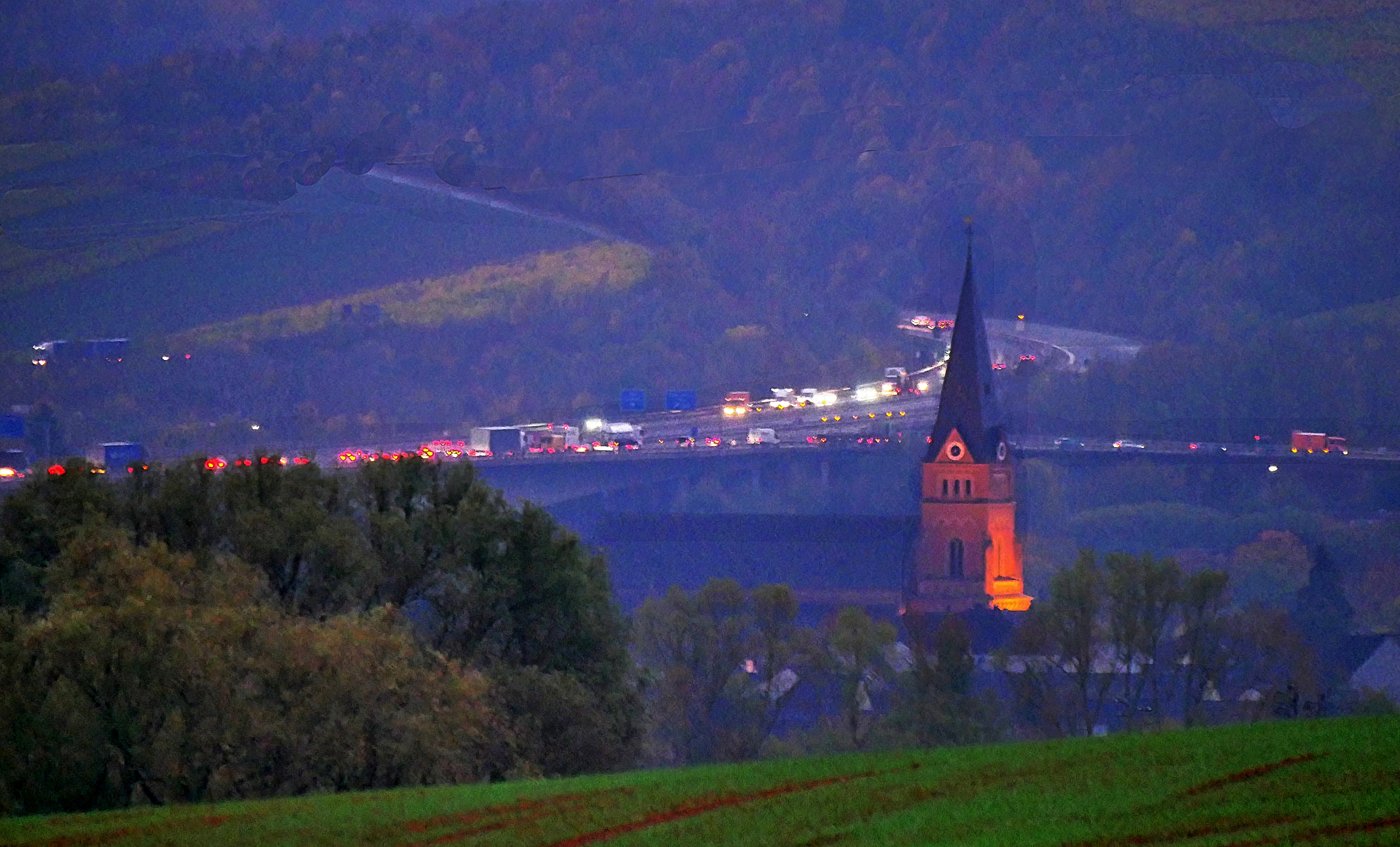 Stau am Autobahndreieck Moseltal. Links die Bundesautobahn A1 in Richtung Saarbrücken, nach rechts zweigt die Bundesautobahn A 602 in Richtung Trier ab. In der Mitte der Turm der Pfarrkirche St. Martin in Schweich.